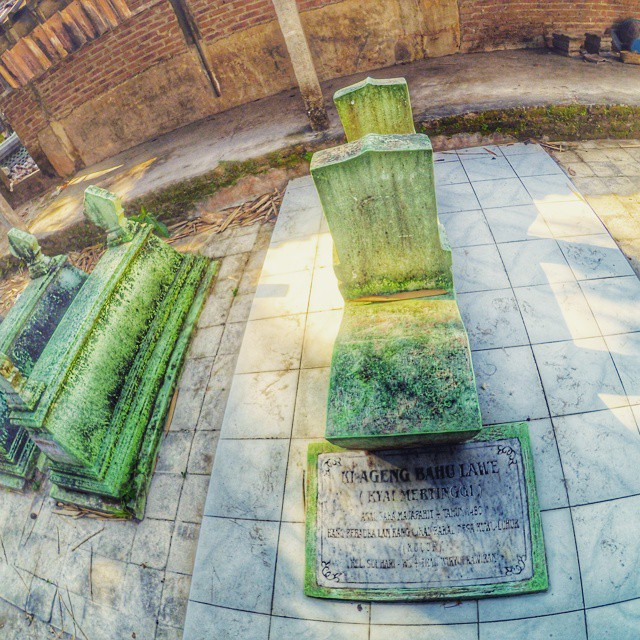 Makam Kyai Mertinggi/Ki Ageng Bahu Lawe yang terletak di kompleks Pemakaman Masjid Kauman Al-Muqorrobin Desa Kulur, Kecamatan Temon